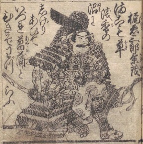 梶原景茂